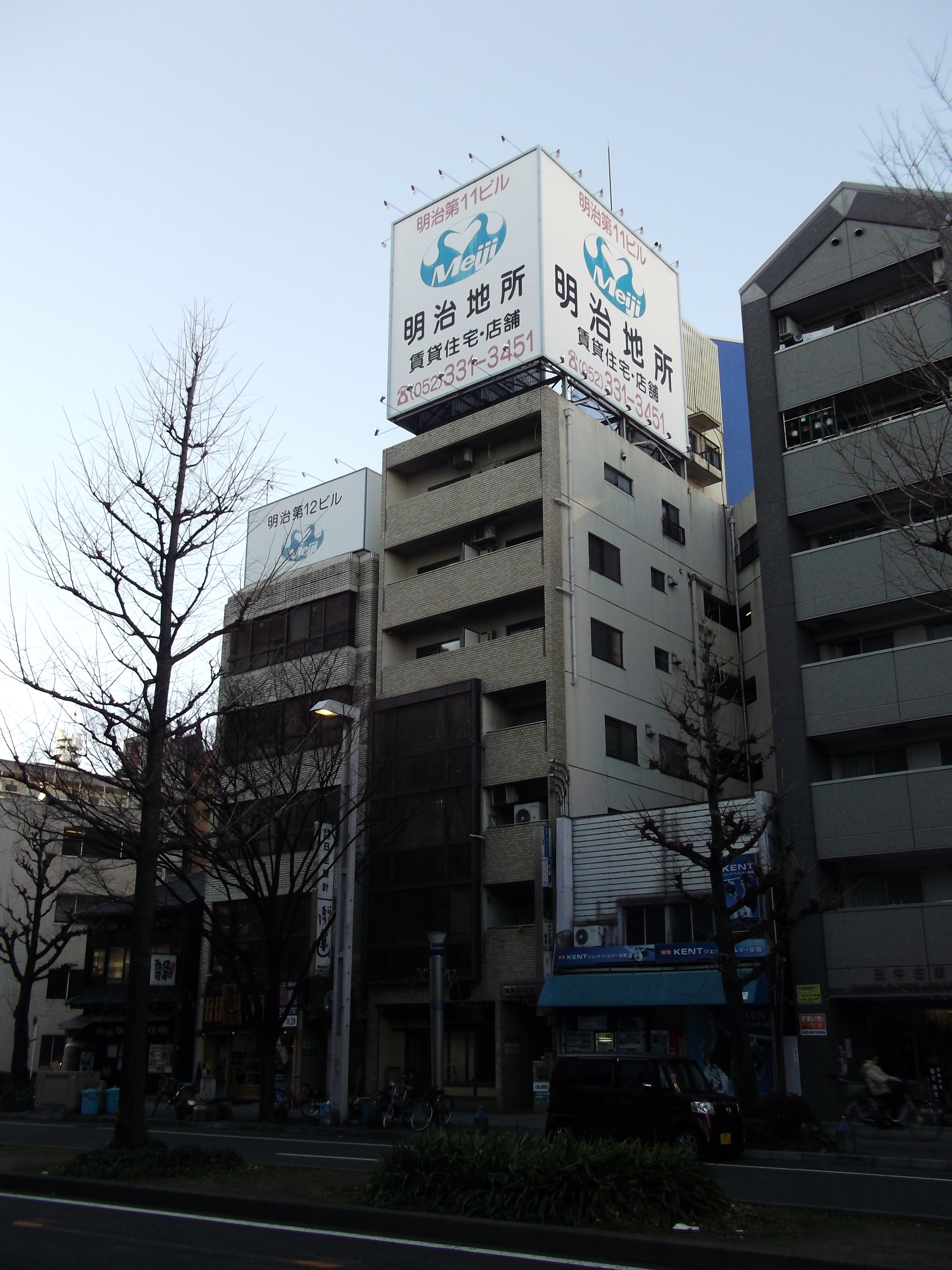 名古屋市中区の明治第11ビル・第12ビルを南側公道東側より撮影